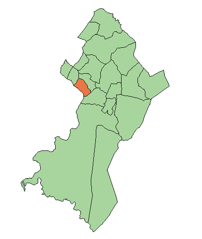 Ubicación de San Antonio.